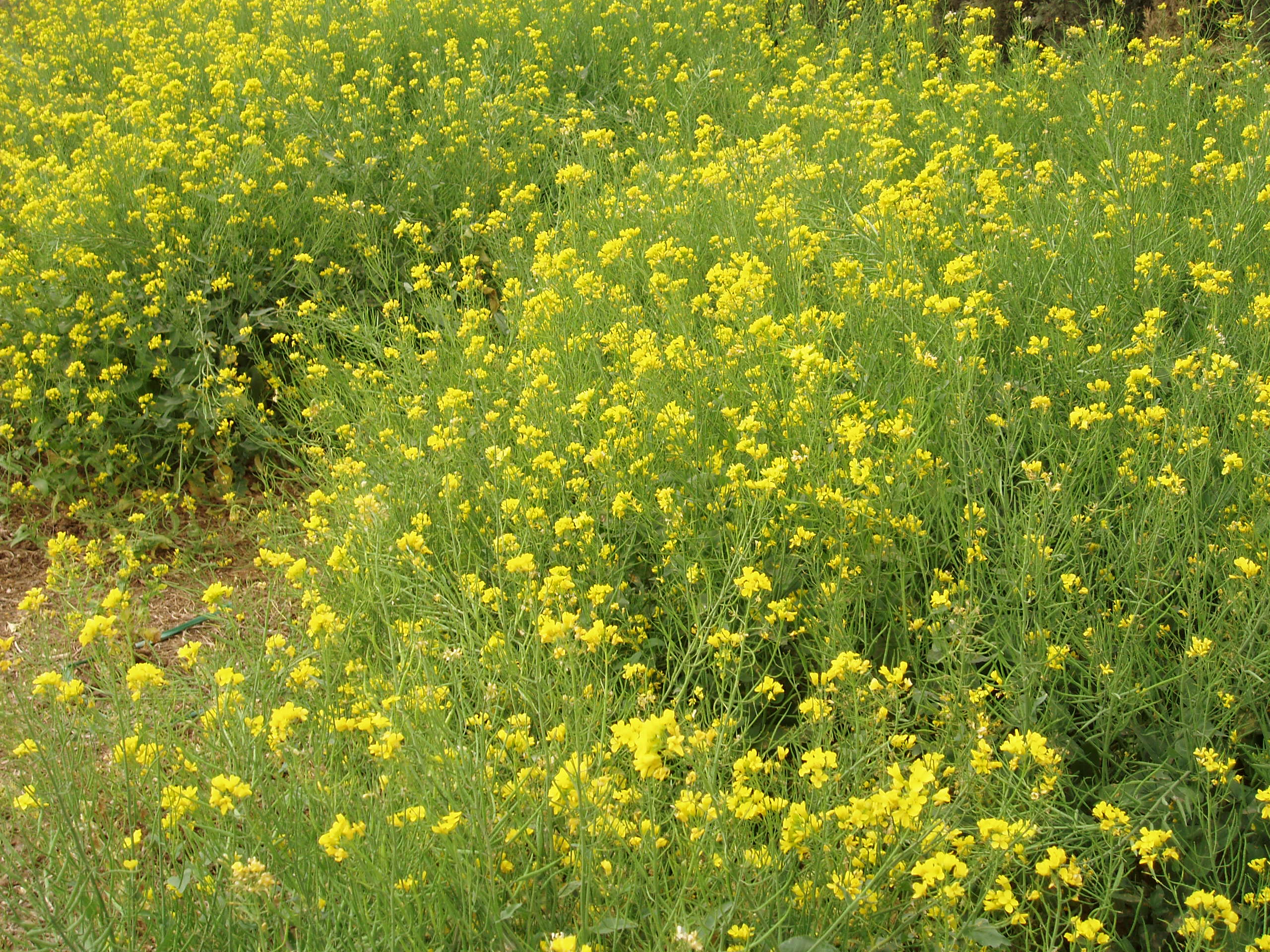 Oriental Cabbage